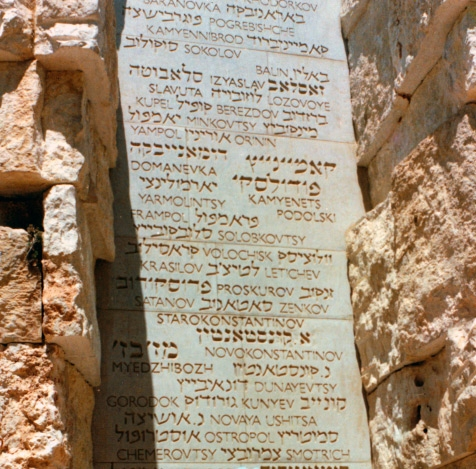 Фотография стеллы Долины Общин (Яд ва-Шем) с названием Каменец-Подольского